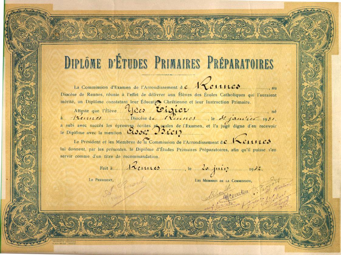 Diplôme d'études primaires préparatoires, délivré en 1942 à Rennes, France.